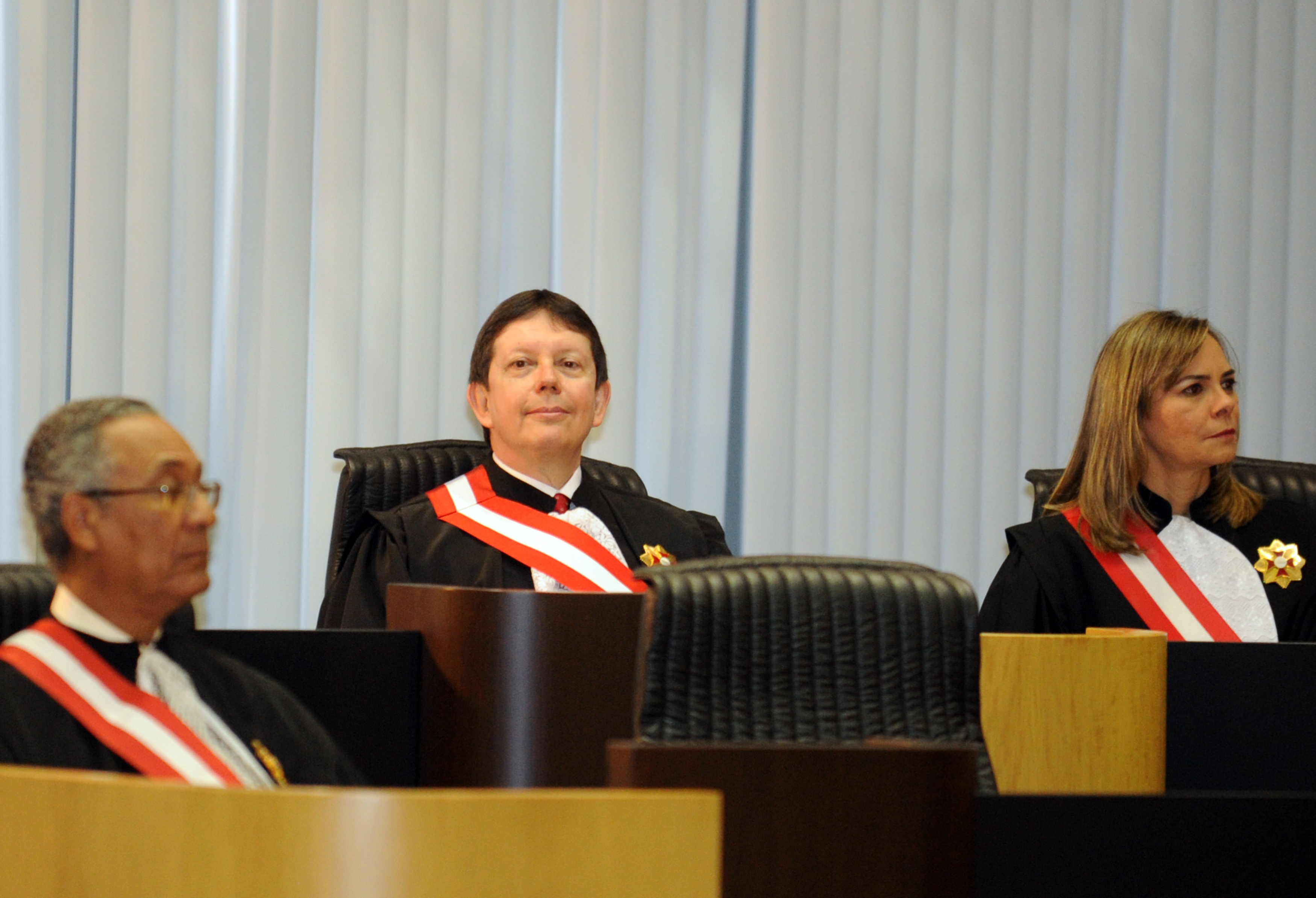 Brasília - O novo ministro do Tribunal Superior do Trabalho, José Roberto Freire Pimenta, durante a cerimônia de posse (Wilson Dias/ABr)